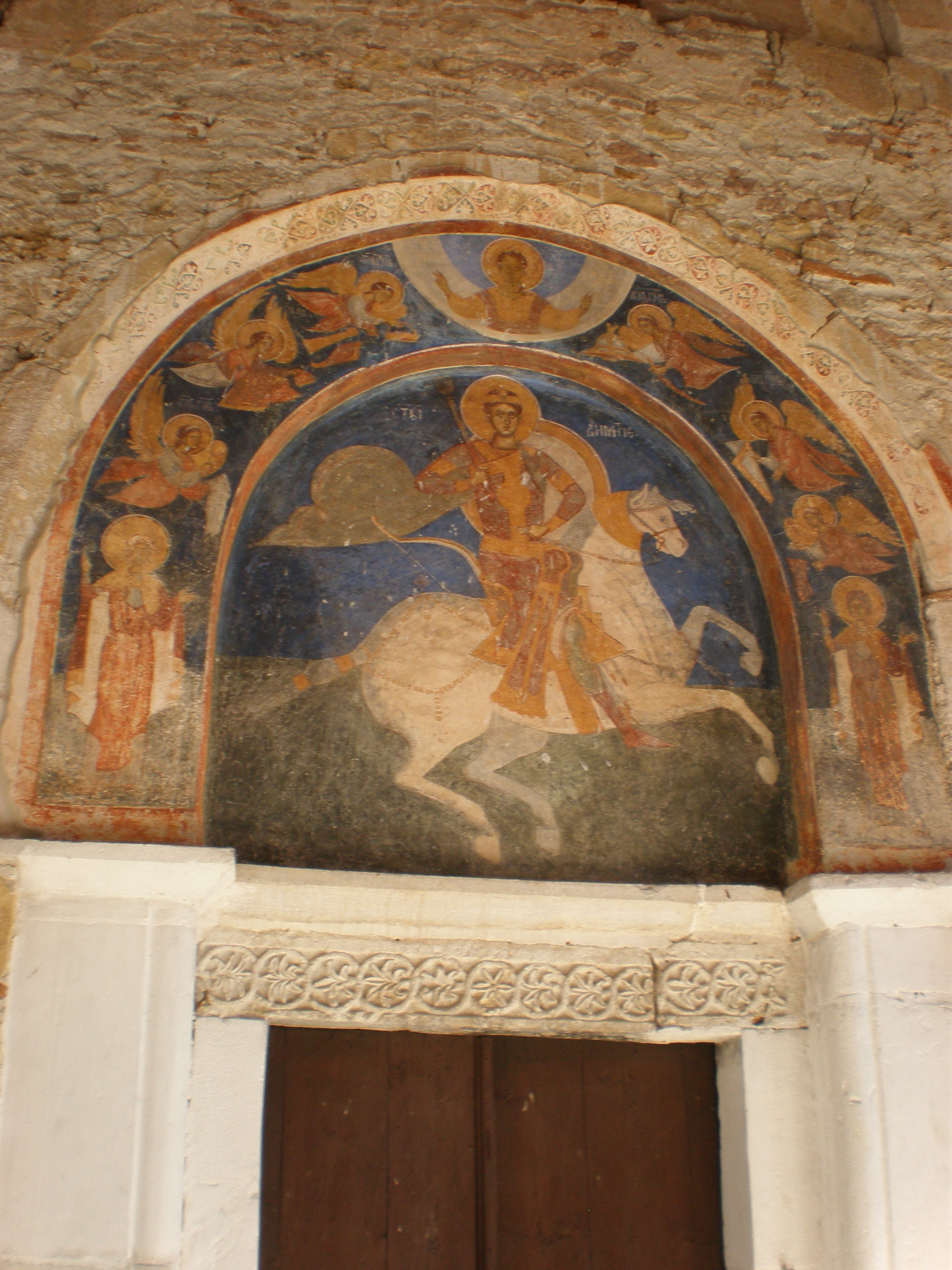 Фреска на Свети Димитриј над влезната врата на црквата во Марковиот Манастир